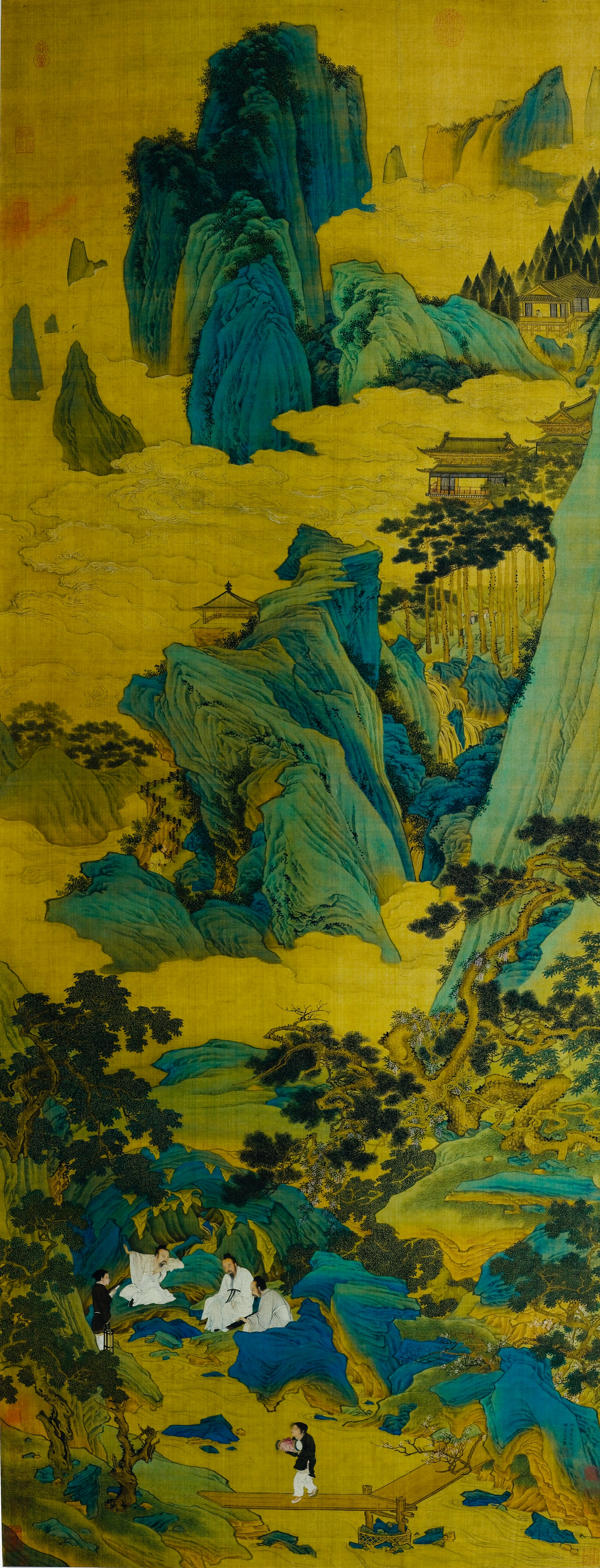 明仇英桃源仙境圖